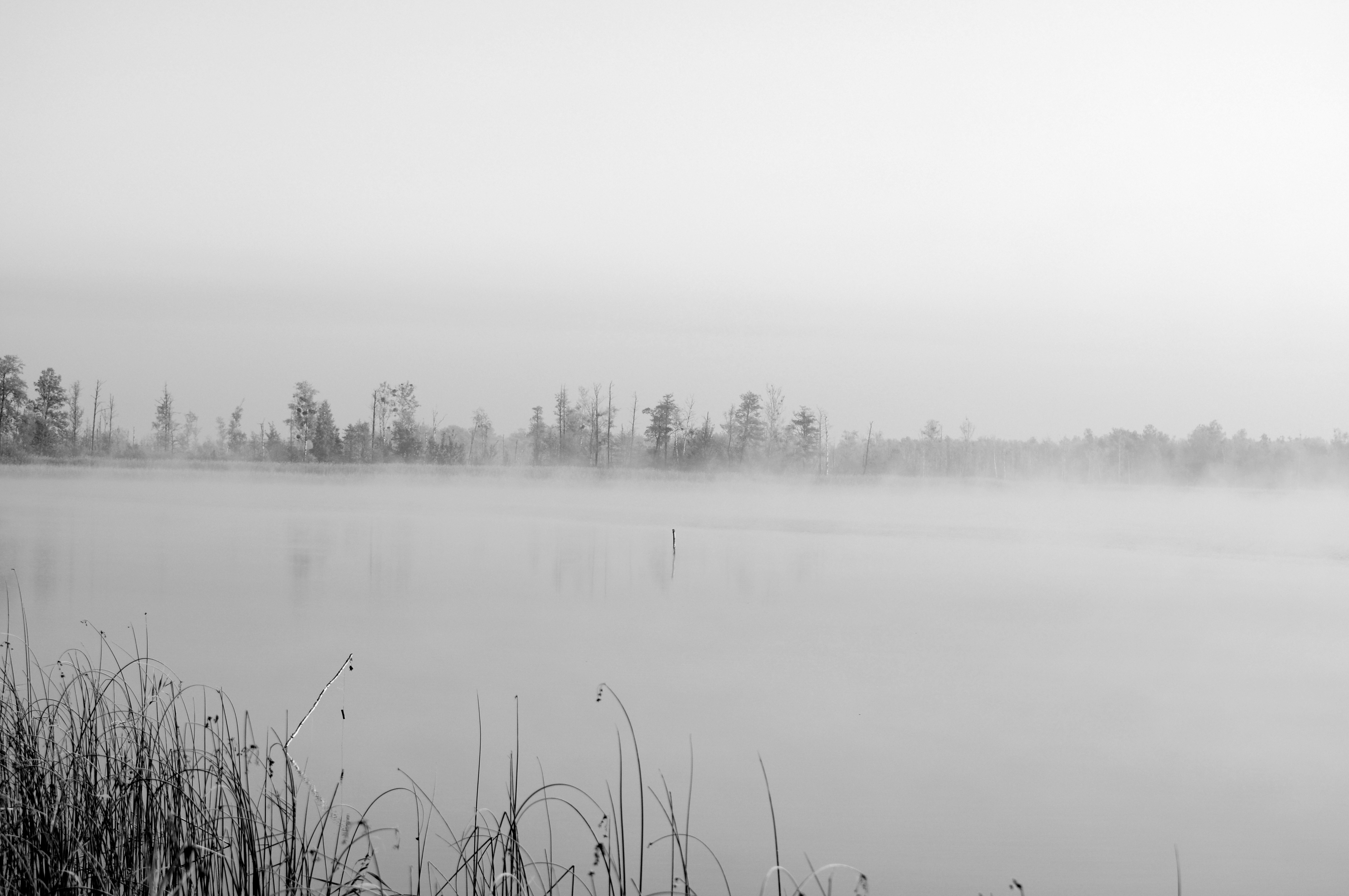 Рівненський природний заповідник, Володимирецький, Дубровицький, Рокитнівський, Сарненський райони